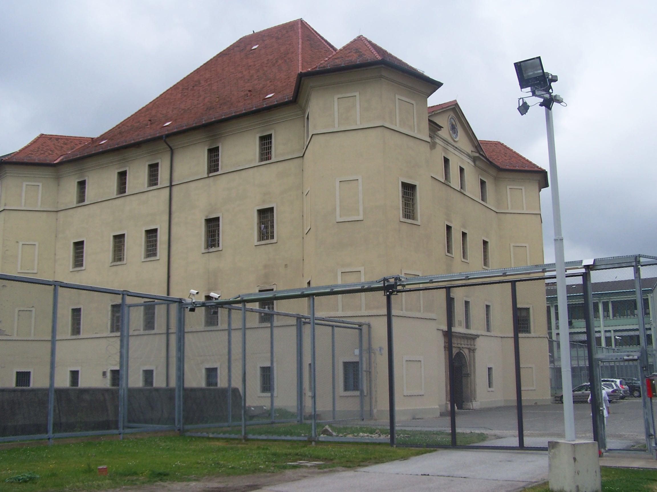 Ehem. Schloss/Strafanstalt Karlau